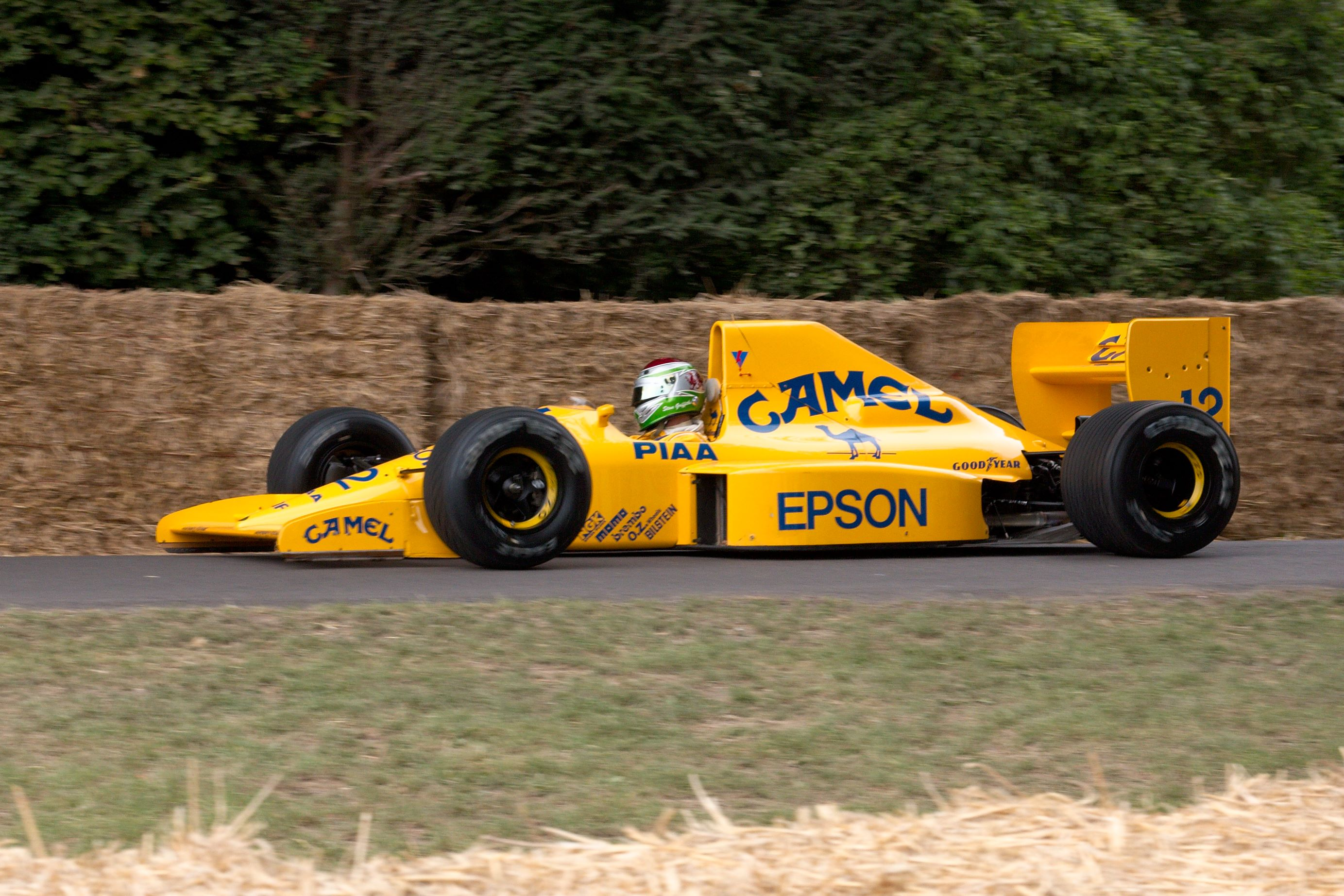 Lotus Judd 101